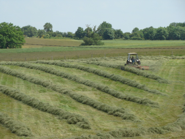 Récolte du foin à Montirat (Tarn, France).